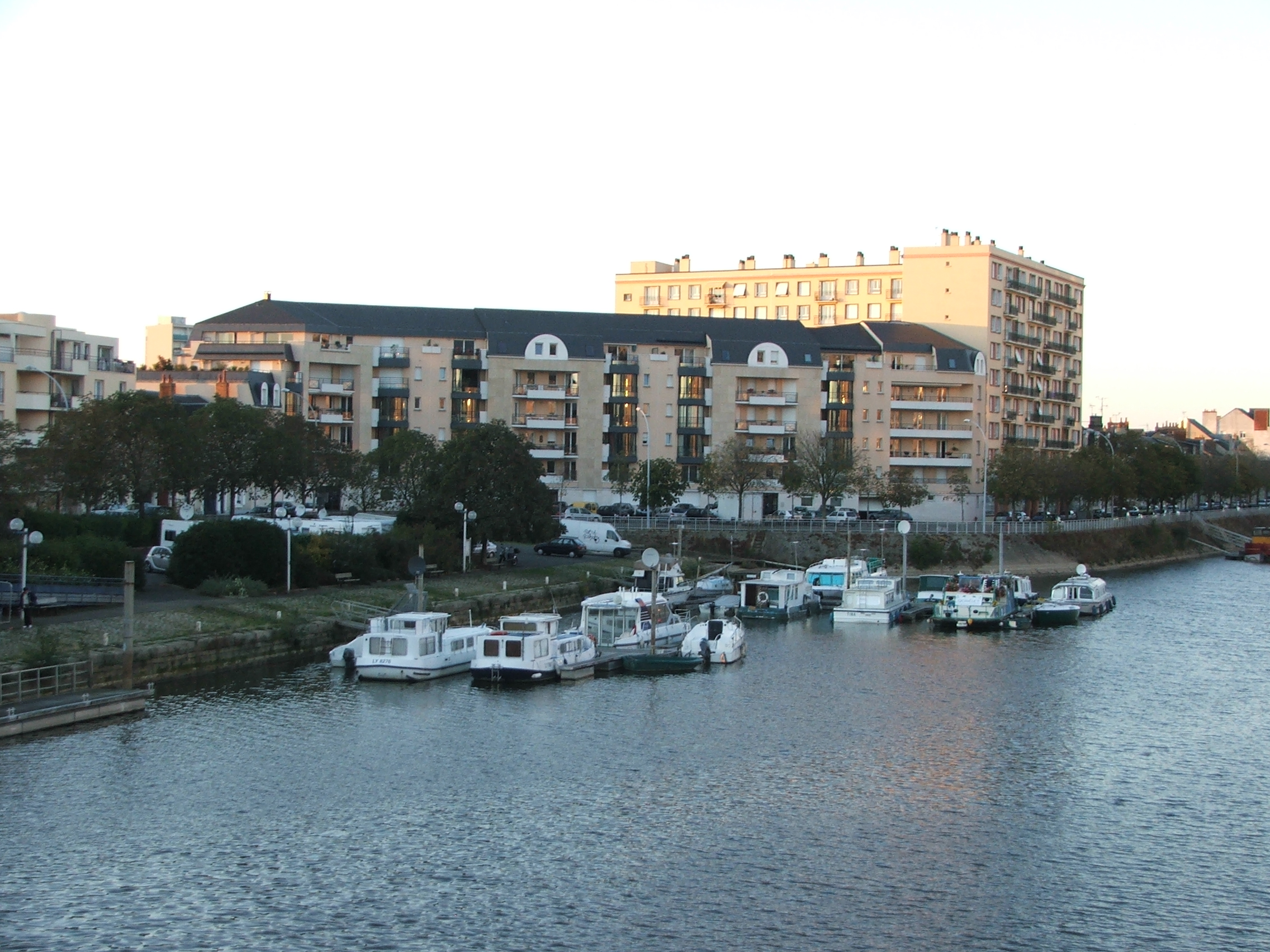 Le port du Mans un soir d'automne.